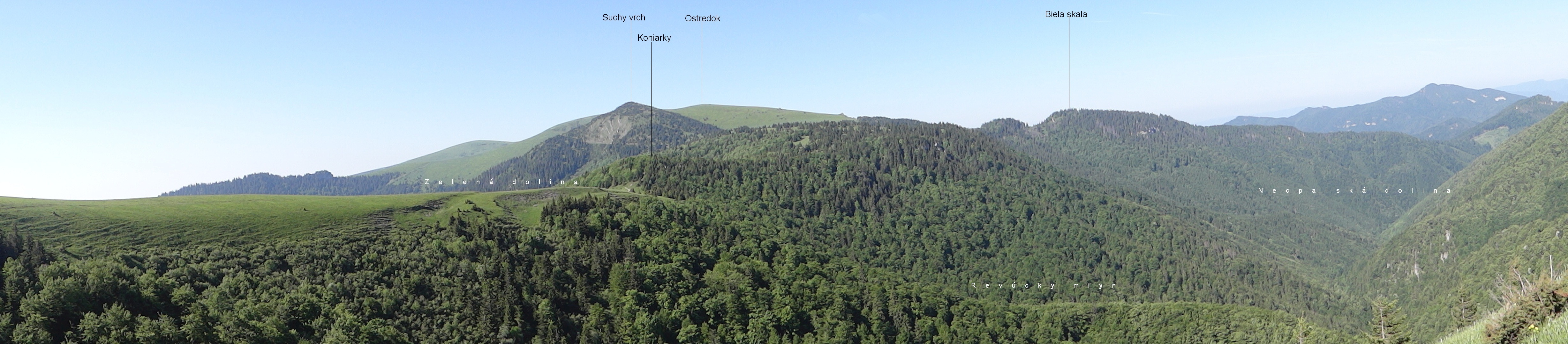 Necpalská dolina